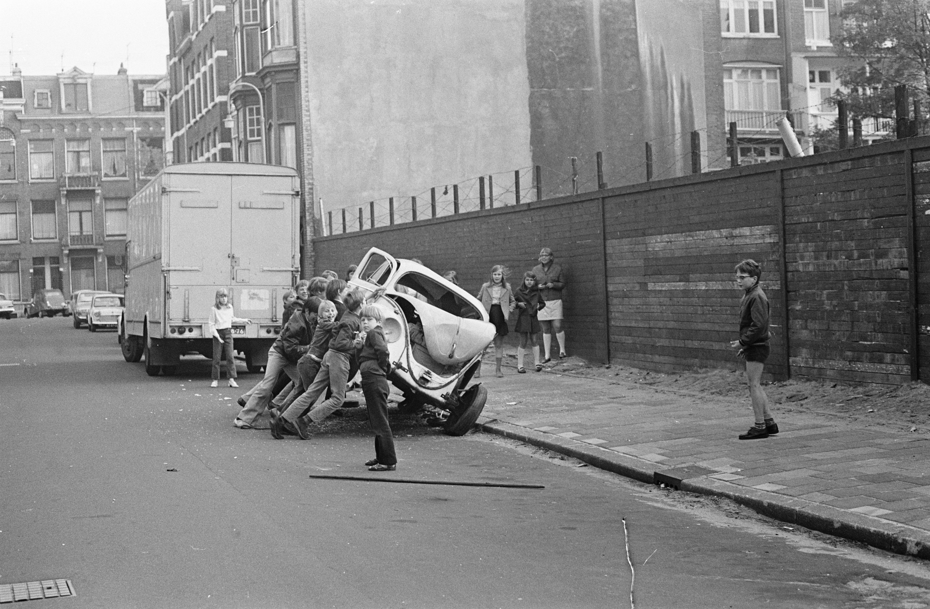 Collectie / Archief : Fotocollectie Anefo Reportage / Serie : [ onbekend ] Beschrijving : Luilak in Amsterdam jongens kantelen auto Datum : 24 mei 1969 Locatie : Amsterdam, Noord-Holland Trefwoorden : Autos, JONGENS Instellingsnaam : Luilak Fotograaf : Mieremet, Rob / Anefo Auteursrechthebbende : Nationaal Archief Materiaalsoort : Negatief (zwart/wit) Nummer archiefinventaris : bekijk toegang 2.24.01.05 Bestanddeelnummer : 922-4560